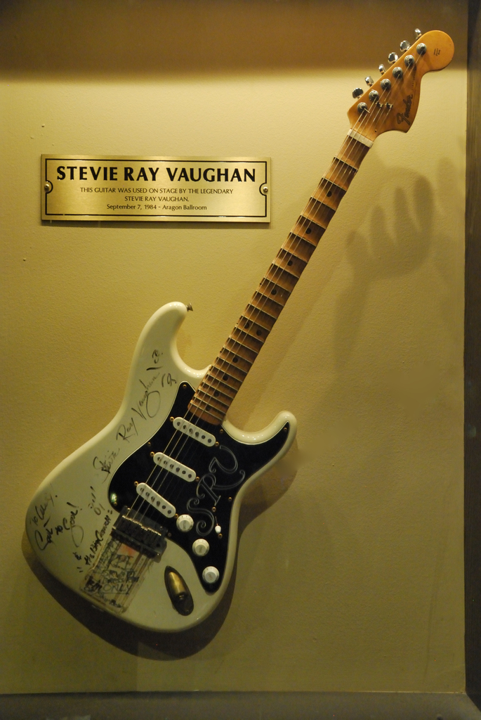 Stevie Ray Vaughan's Guitar @ blues bar, Chicago “THIS GUITAR WAS USED ON STAGE BY THE LEGENDARY STEVIE RAY VAUGHAN. September 7, 1984 - Aragon Ballroom” CámaraNikon D60 Exposición0,1 sec (1/10) Aperturef/4.8 Lente35 mm Lente35.6 mm Velocidad ISO1600 Tendencia de exposición0 EV